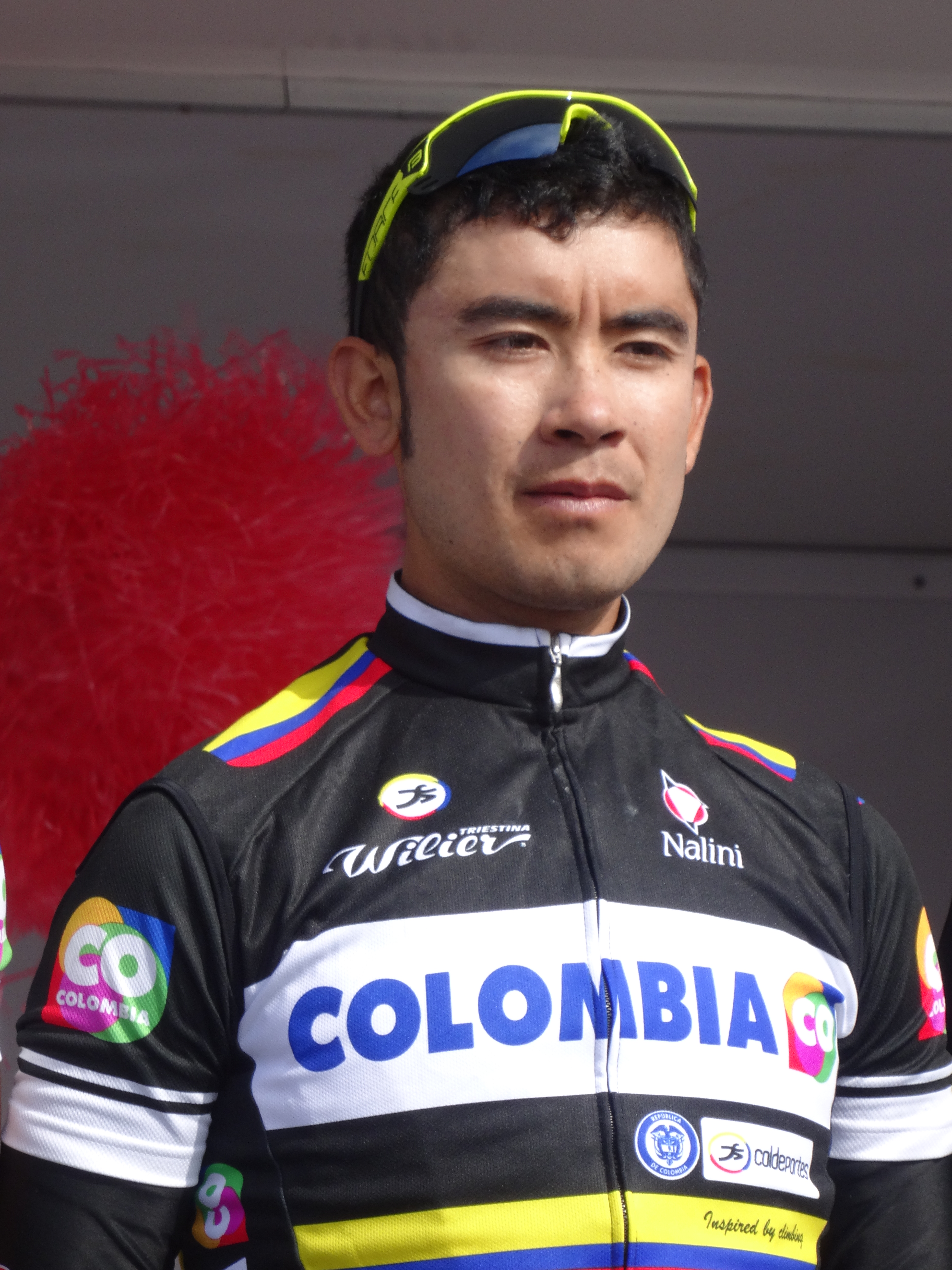 Reportage réalisé le jeudi 17 avril à l'occasion du départ et de l'arrivée du Grand Prix de Denain 2014 à Denain, Nord, Nord-Pas-de-Calais, France.